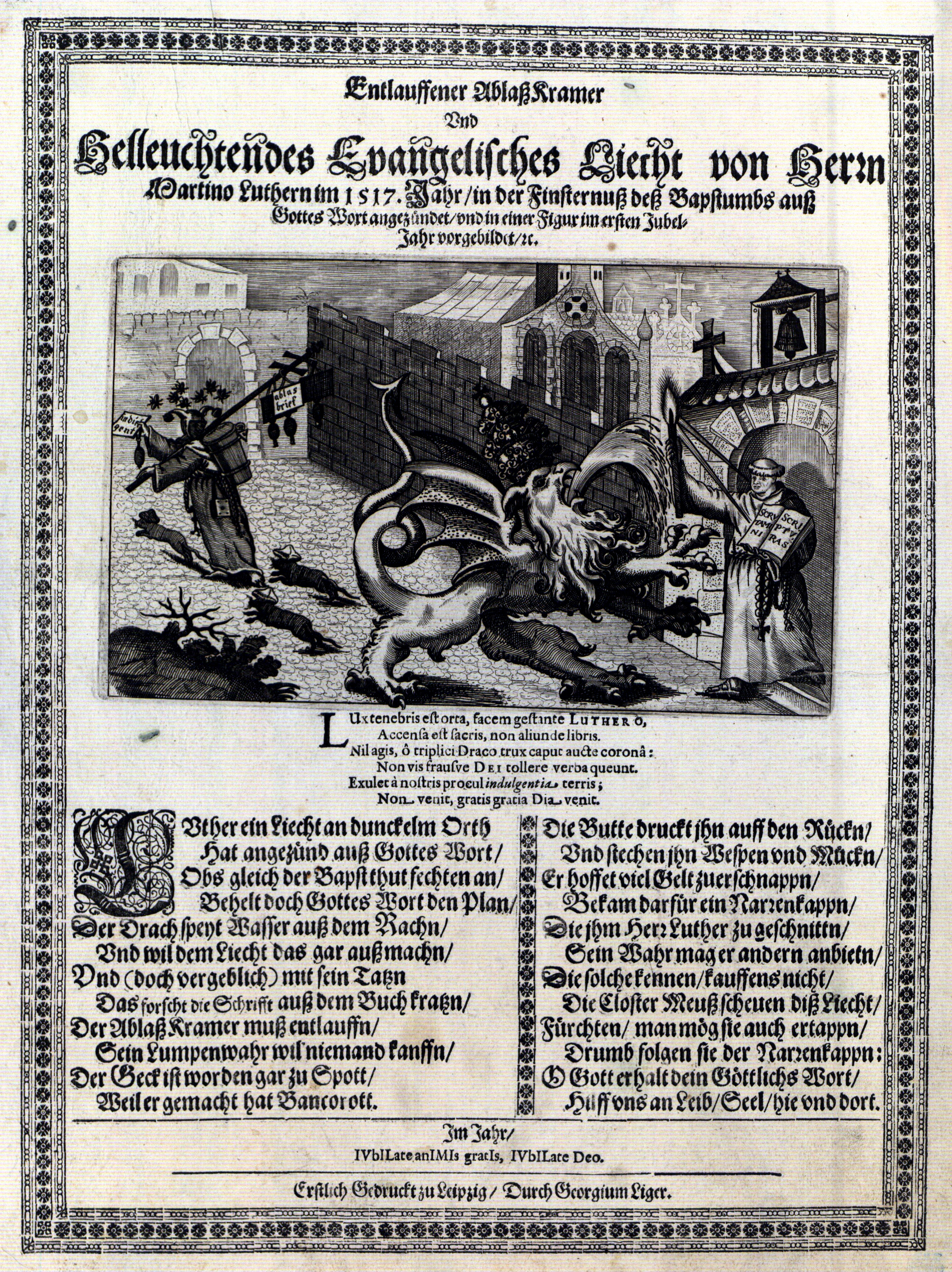 Entlauffener Ablaß Kramer//Vnd//Helleuchtendes Evangelisches Liecht von Herrn//Martino Luthern…, Kupferstich, Verleger: Georg Liger, Leipzig 1617